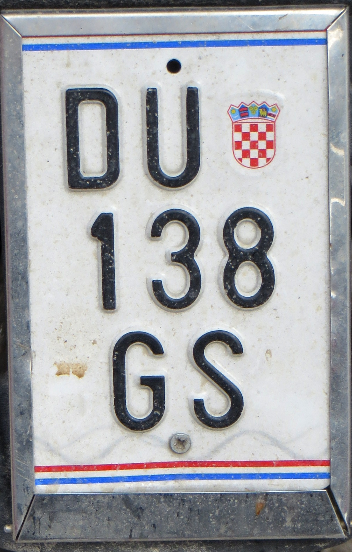 Bromfiets kentekenplaat Kroatië